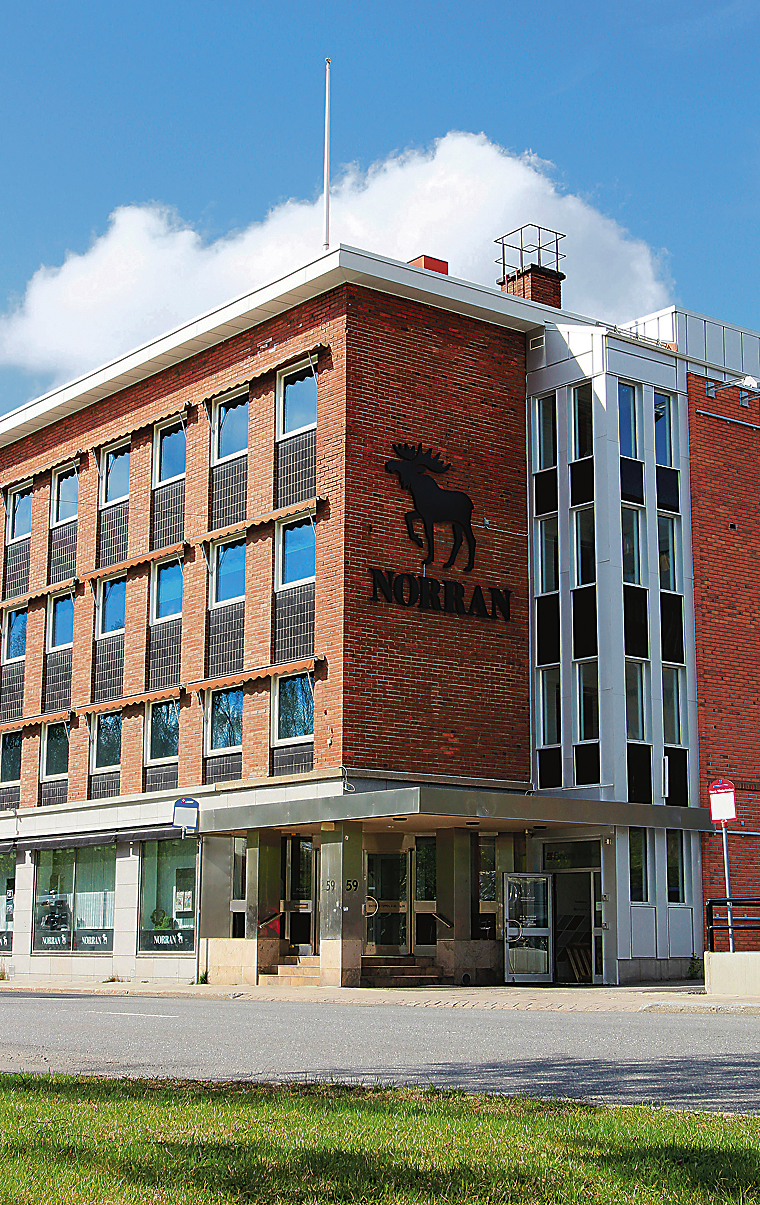 Norrans lokal